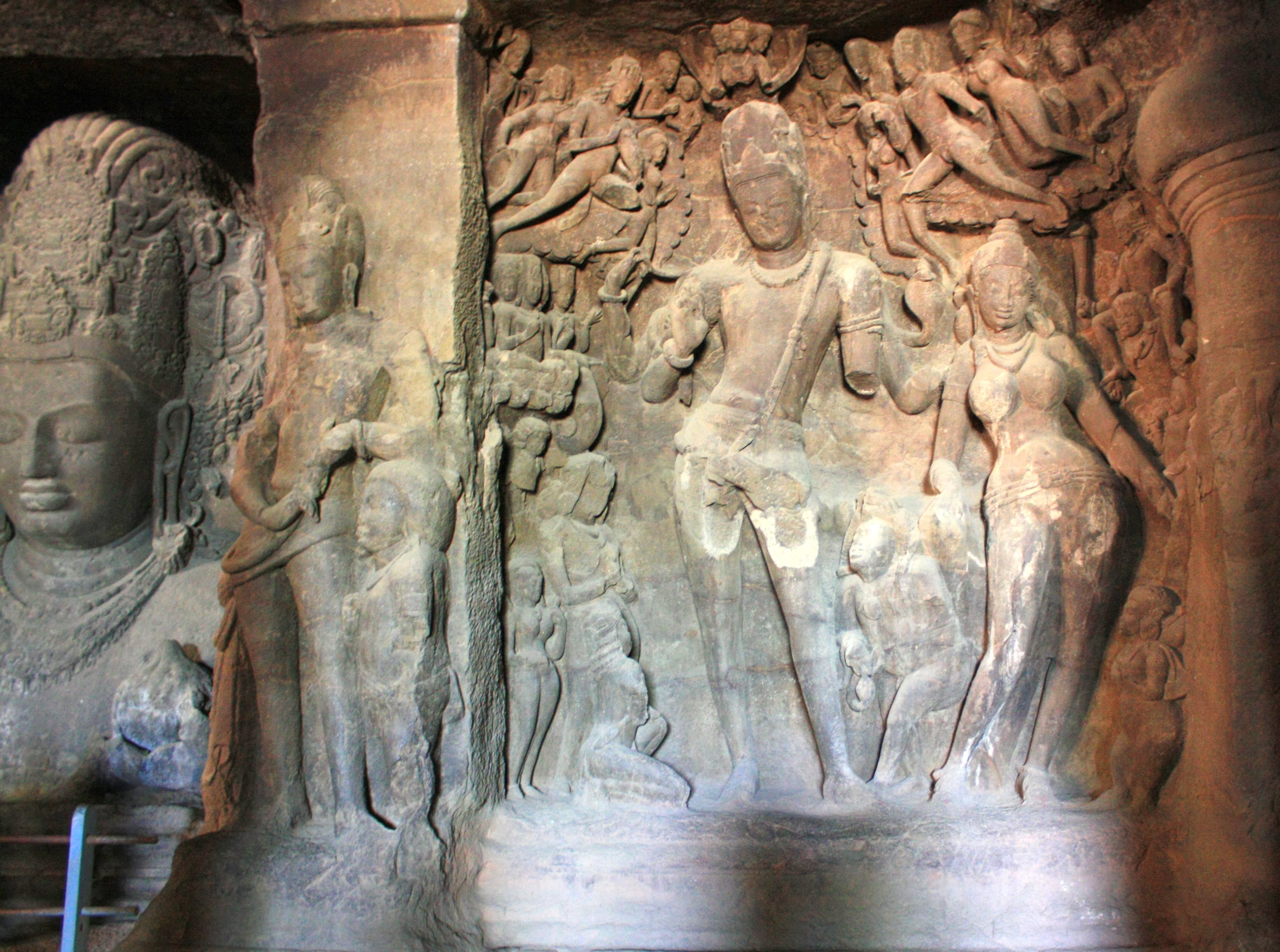 Elephanta Caves Gangadhara